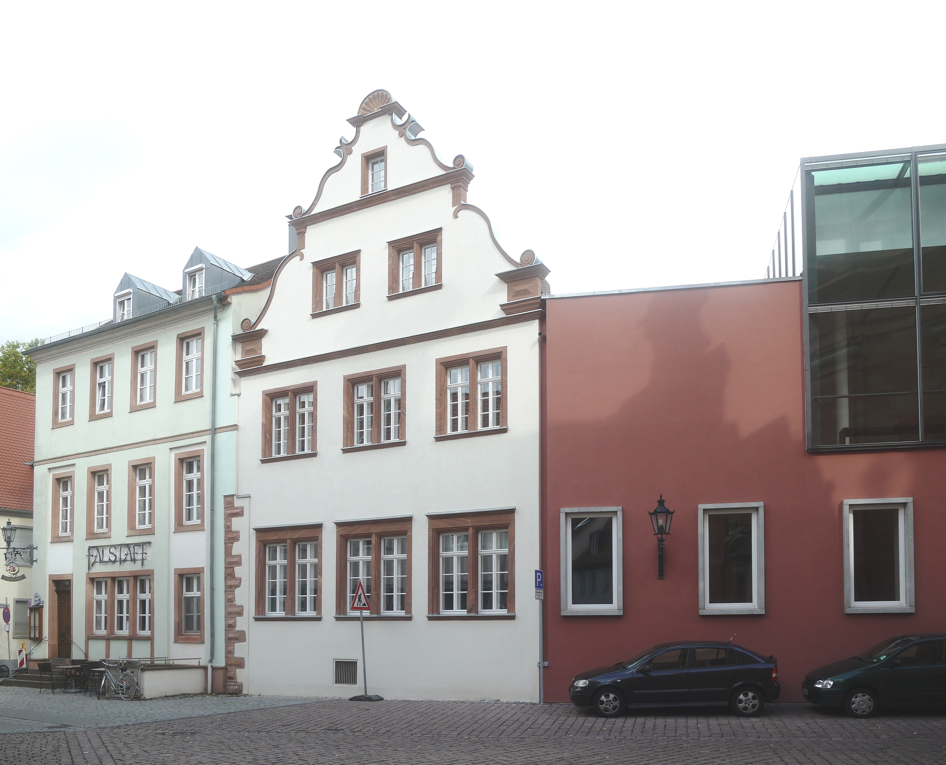 Schlossgasse 10 in Aschaffenburg, denkmalgeschützt, in den Theatherkomplex (rechts, Schlossgasse 8) integriert